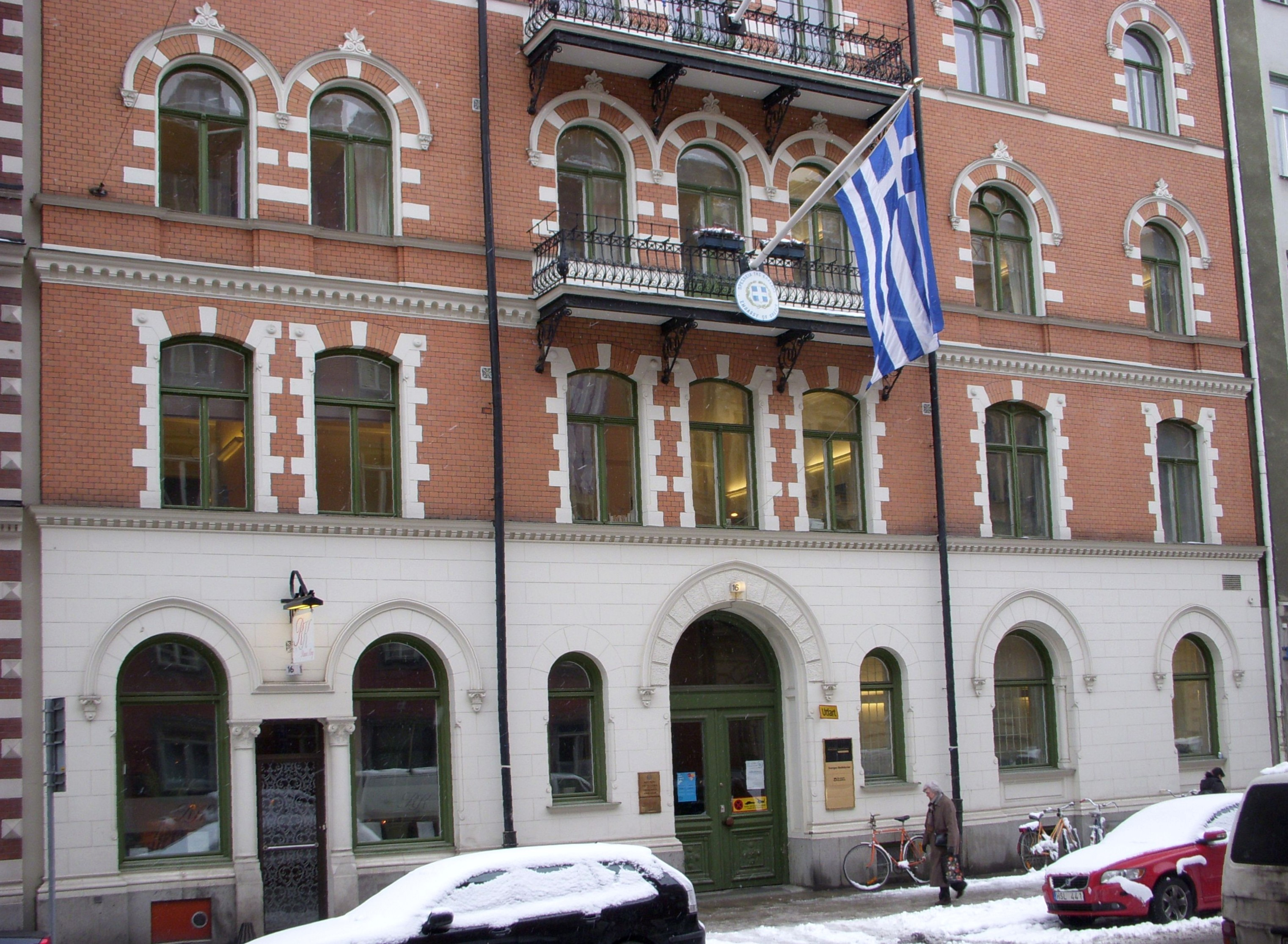 Greklands ambassad i Stockholm